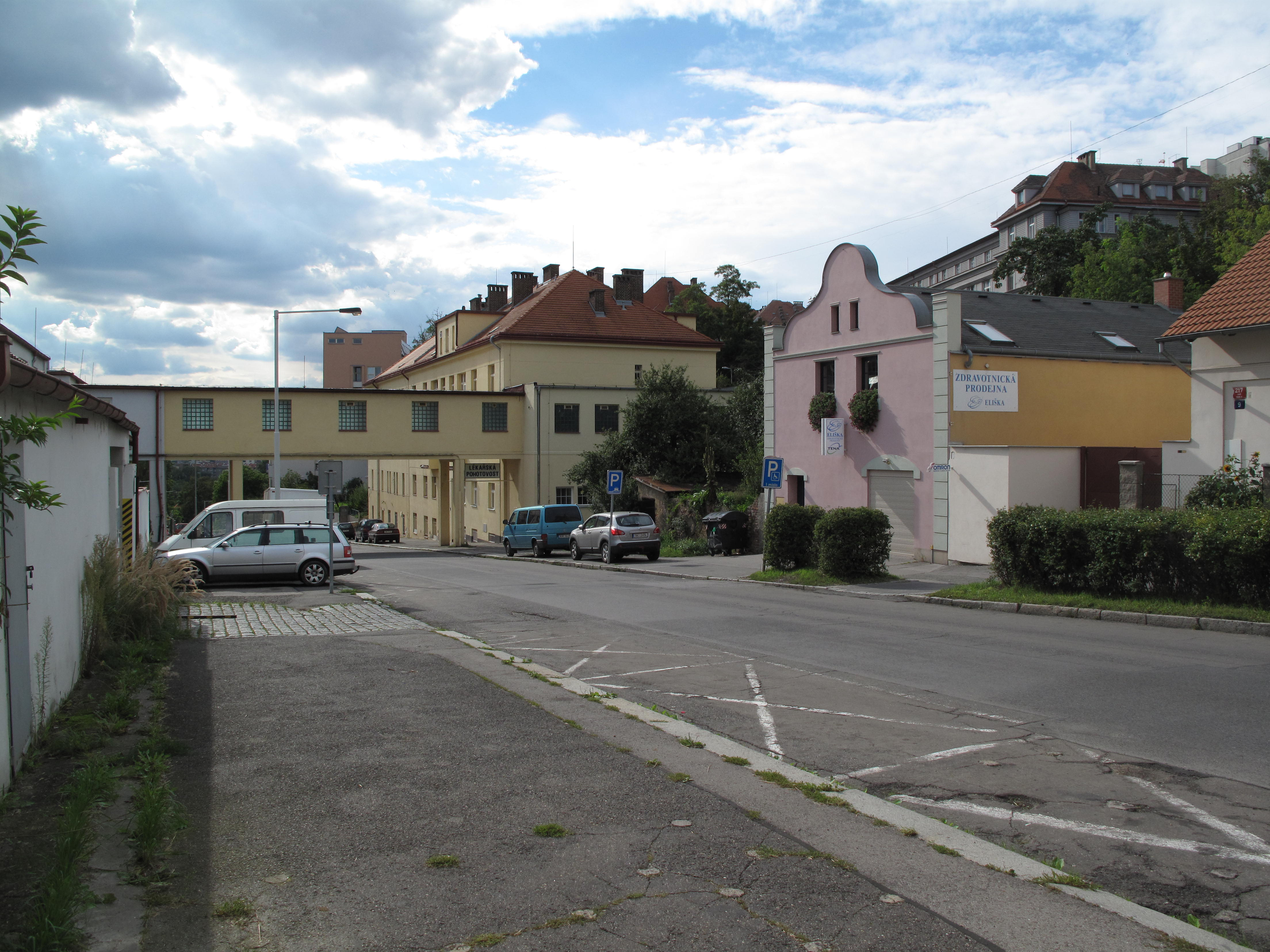 Ulice Bulovka